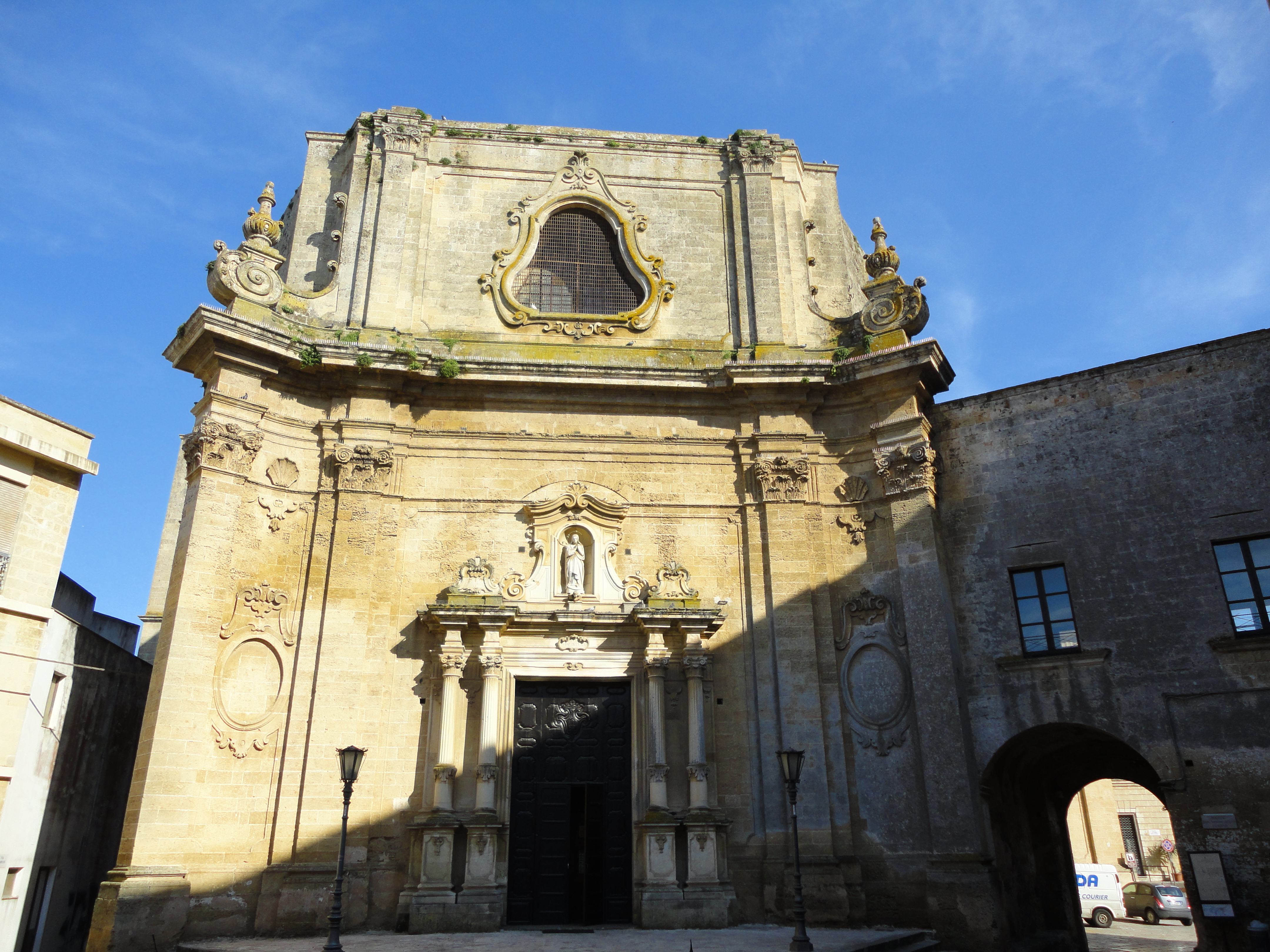 Chiesa Madre di Tricase, Lecce